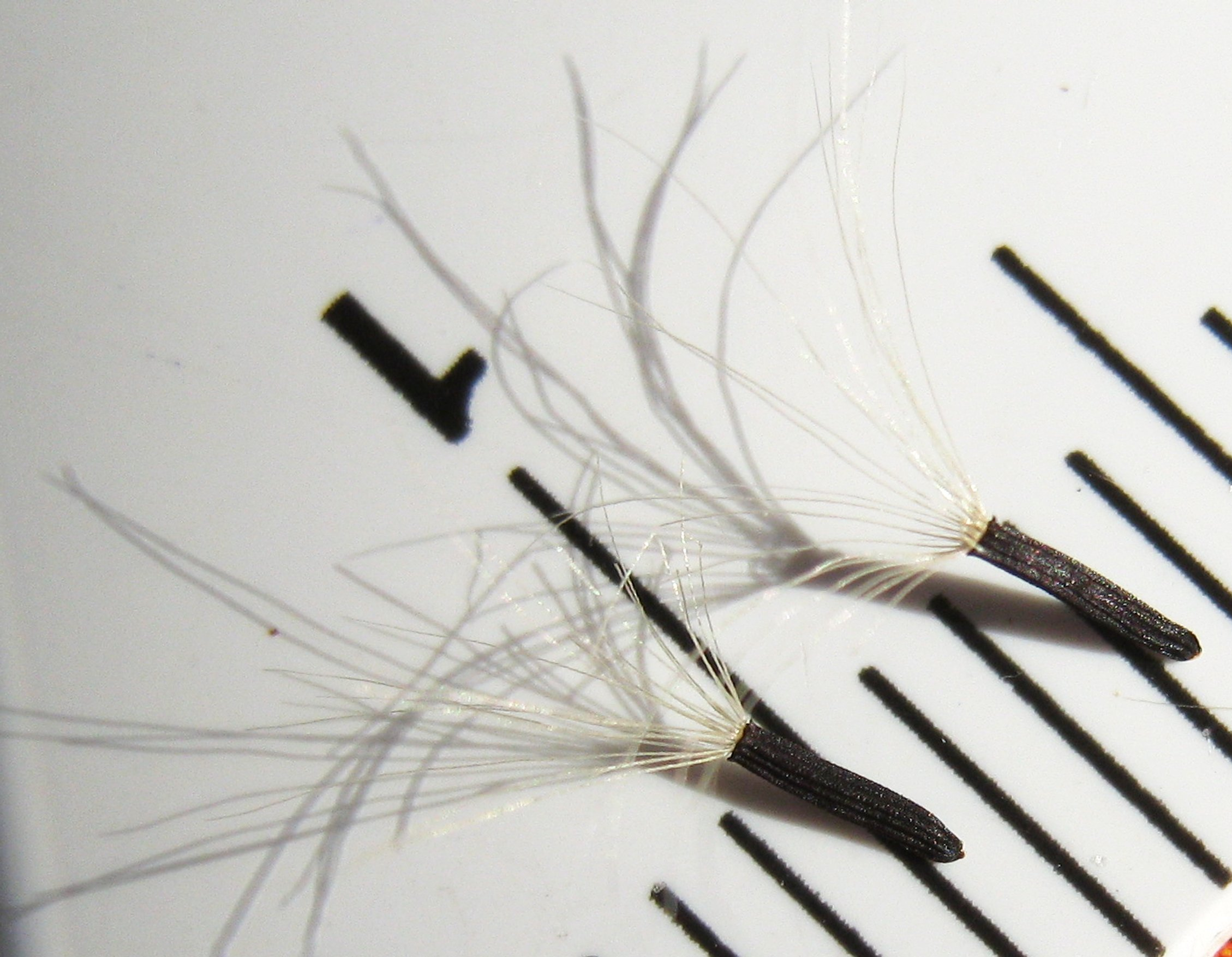 Aqueni de H. tardans Peter, típic del subgènere pilosella